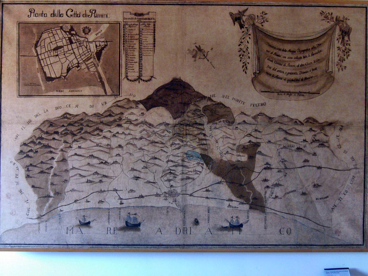 Ancient map of Rimini and surroundings. Museo della città di Rimini.